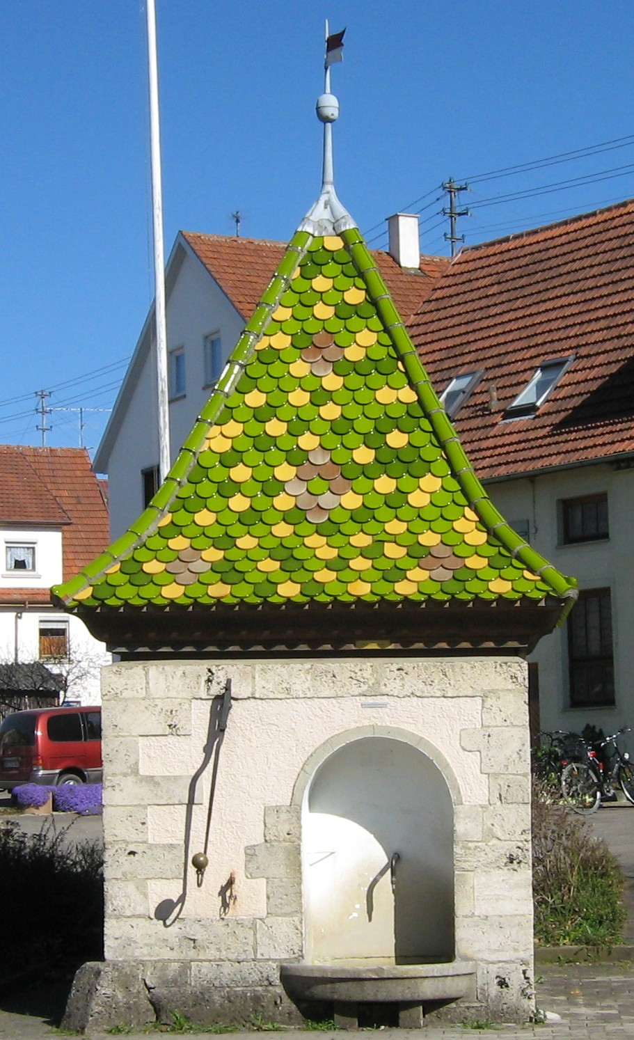 Sauerbrunnen in Engstingen-Kleinengstingen, Germany; a mineral spring